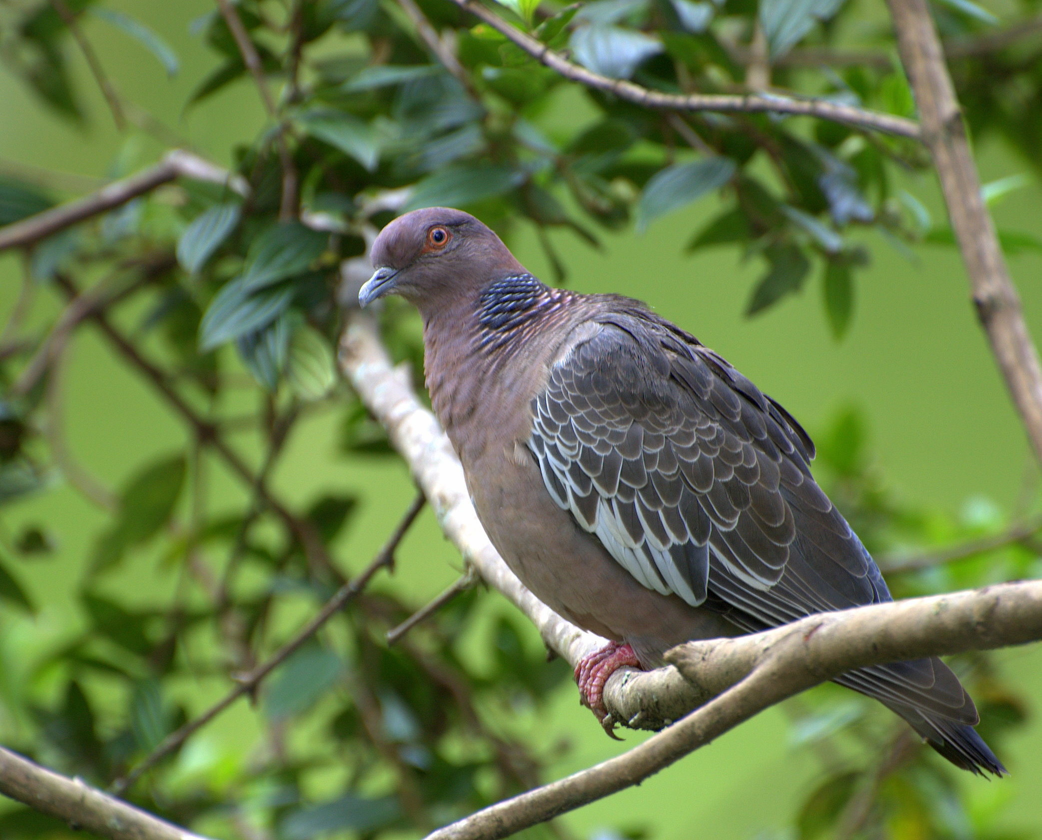 Jardim Zoológico de São Paulo (AVE LIVRE DENTRO DO PARQUE)